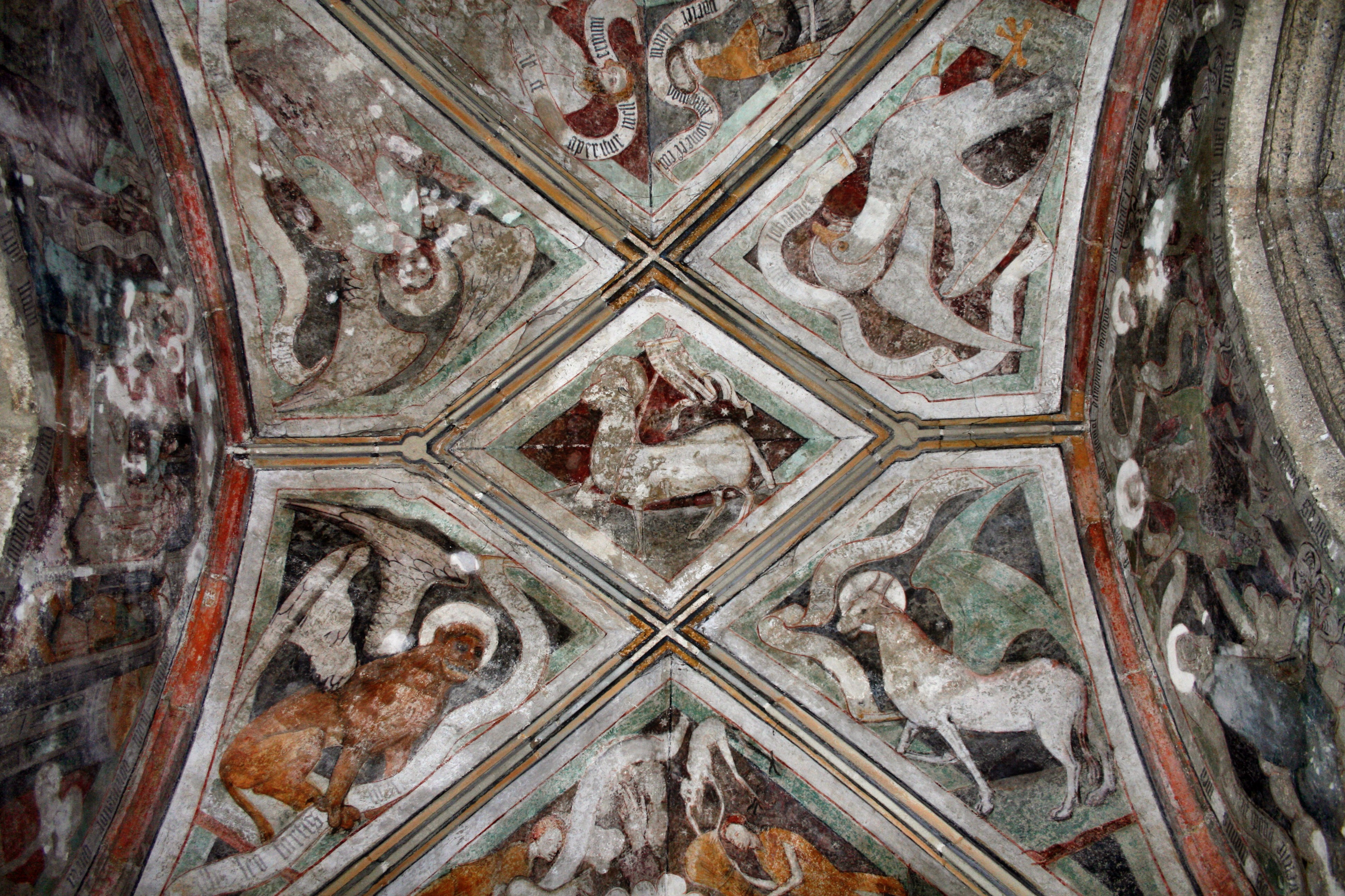 Deckenfresko im östlichen Vorzeichen von Hans Strigel d. Ä. um 1445. Es zeigt die vier Evangelisten mit Jesus in der Mitte als Lamm Gottes abgebildet.